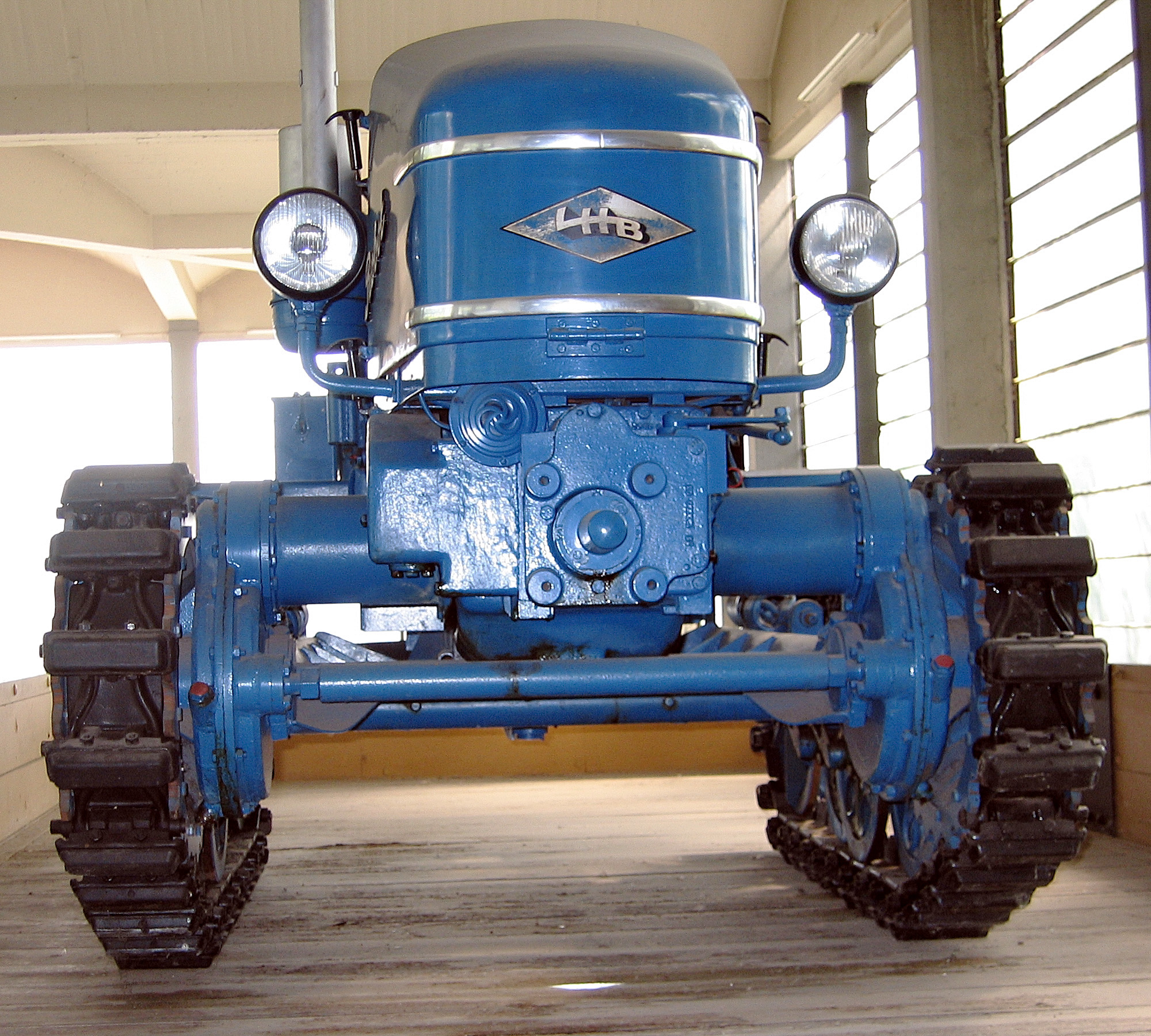 LHB Robot Raupenschlepper mit 25 PS; nur eine geringe Stückzahl wurde hergestellt